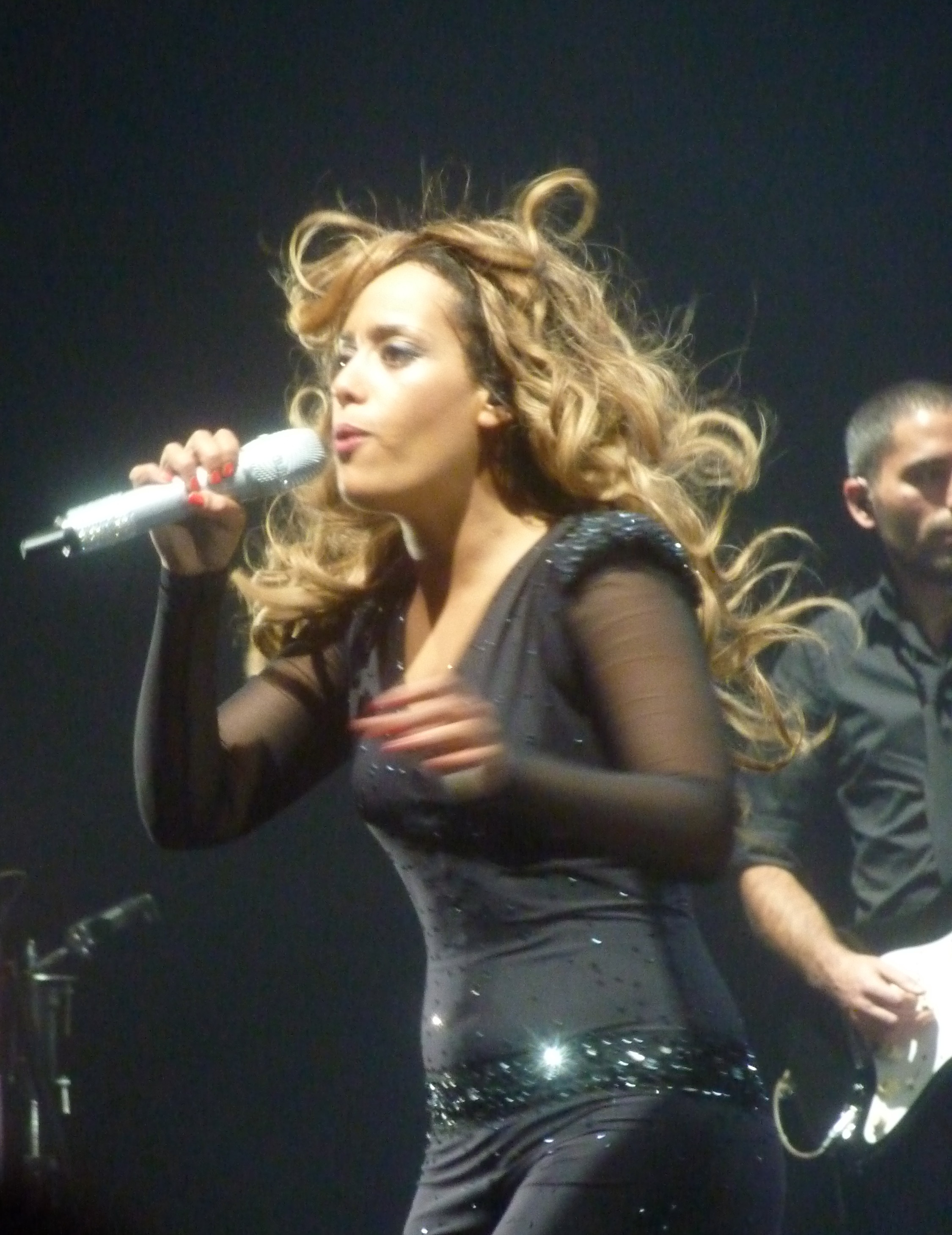 Amel bent en concert à l'olympia en Mai 2010 Photos et vidéos de concerts Live in PARIS sur mon blog